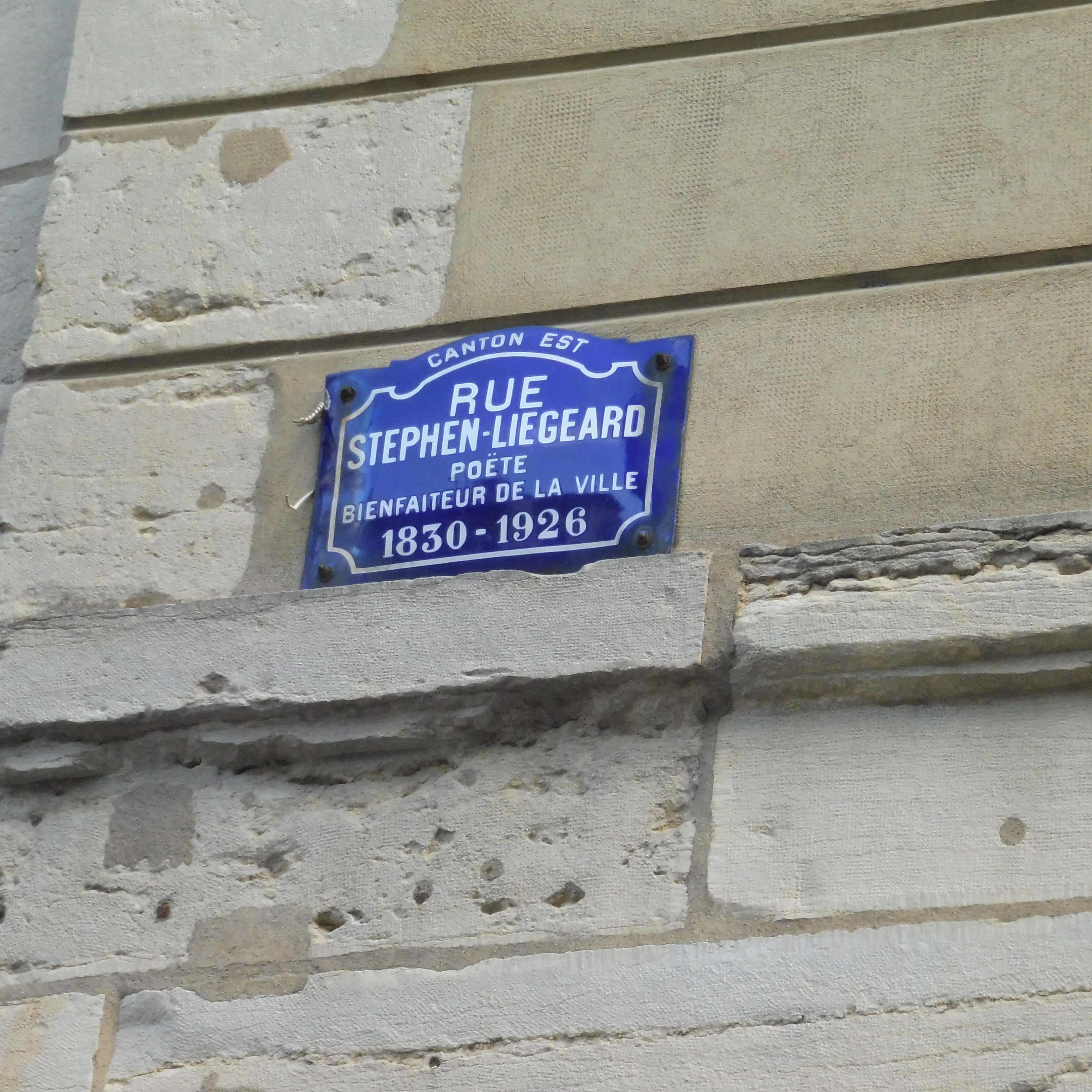 Plaque de rue Stephen Liégeard à Dijon-21.